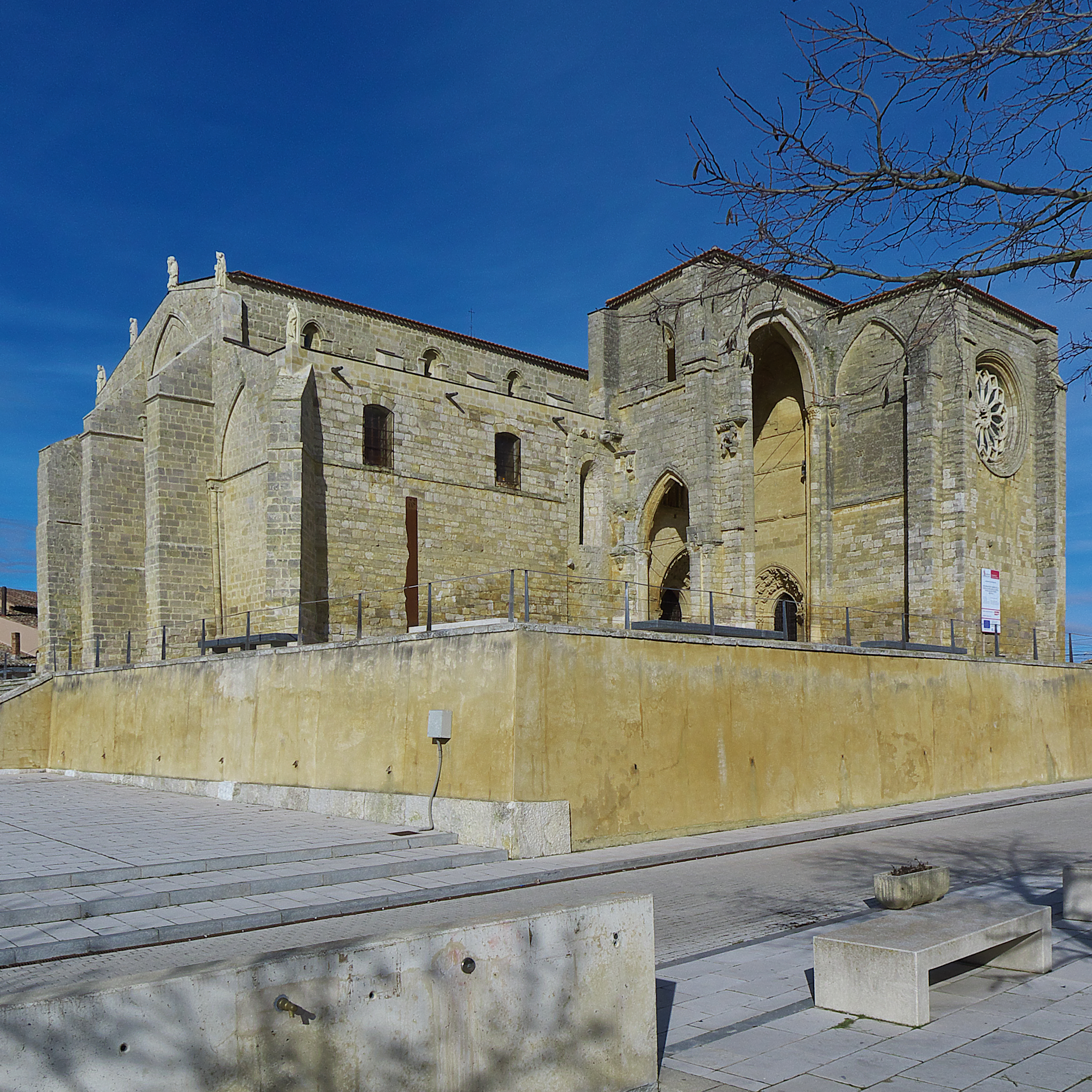 Fachada meridional de la iglesia (s. XIII). La fábrica de la iglesia se construiría entre 1165 y 1196, según la cantiga 229 de Alfonso X.